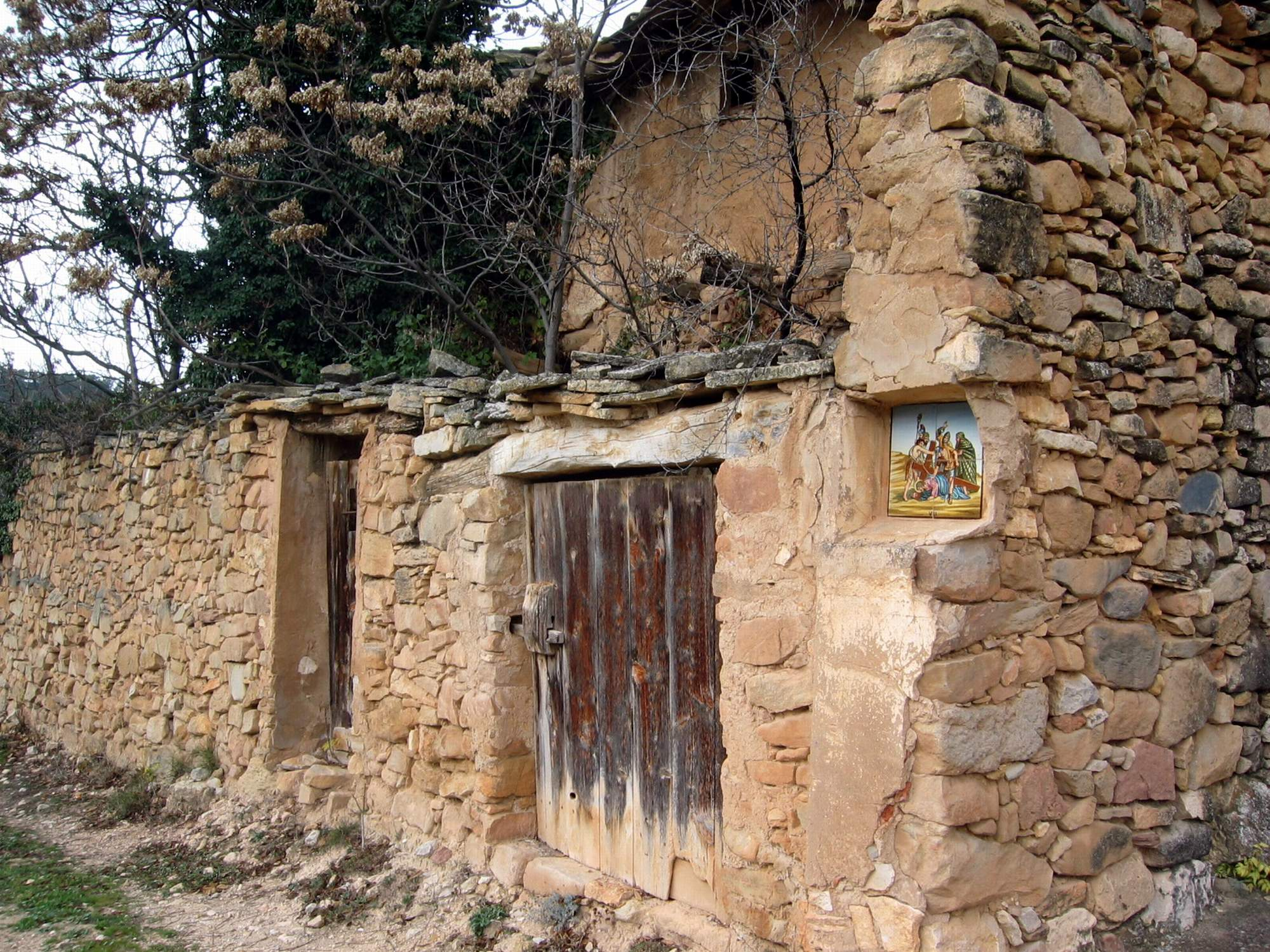 Estación VII del Viacrucis de Val de la Sabina, Ademuz (Valencia): detalle de ubicación en hornacina y pilastra.